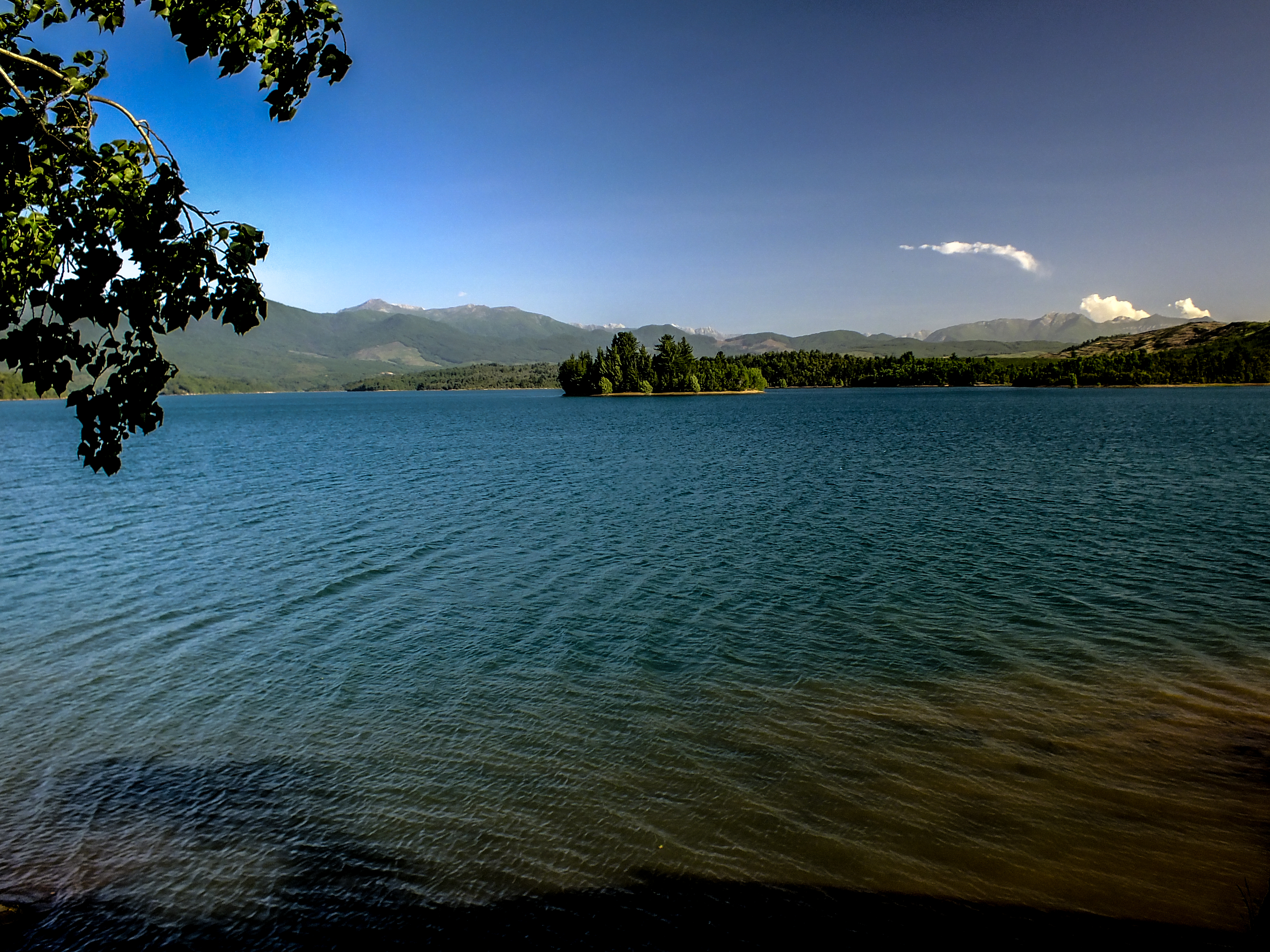 Embalse Digua que Corresponde a un apresamiento de aguas para regadío, por lo que el aprovechamiento de sus riberas se encuentra limitado, debido a los continuos cambios de nivel.